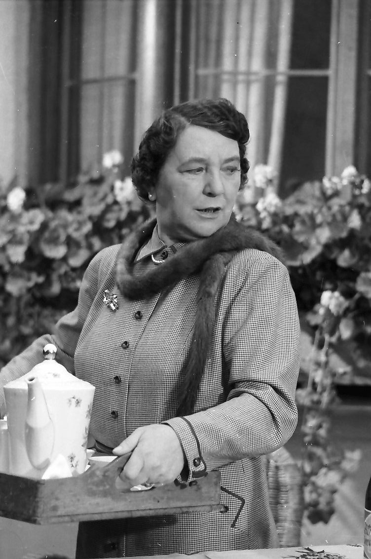 München: Dreharbeiten zu dem Film In München steht ein Hofbräuhaus; Liesl Karlstadt als Wirtin des Hofbräuhauses